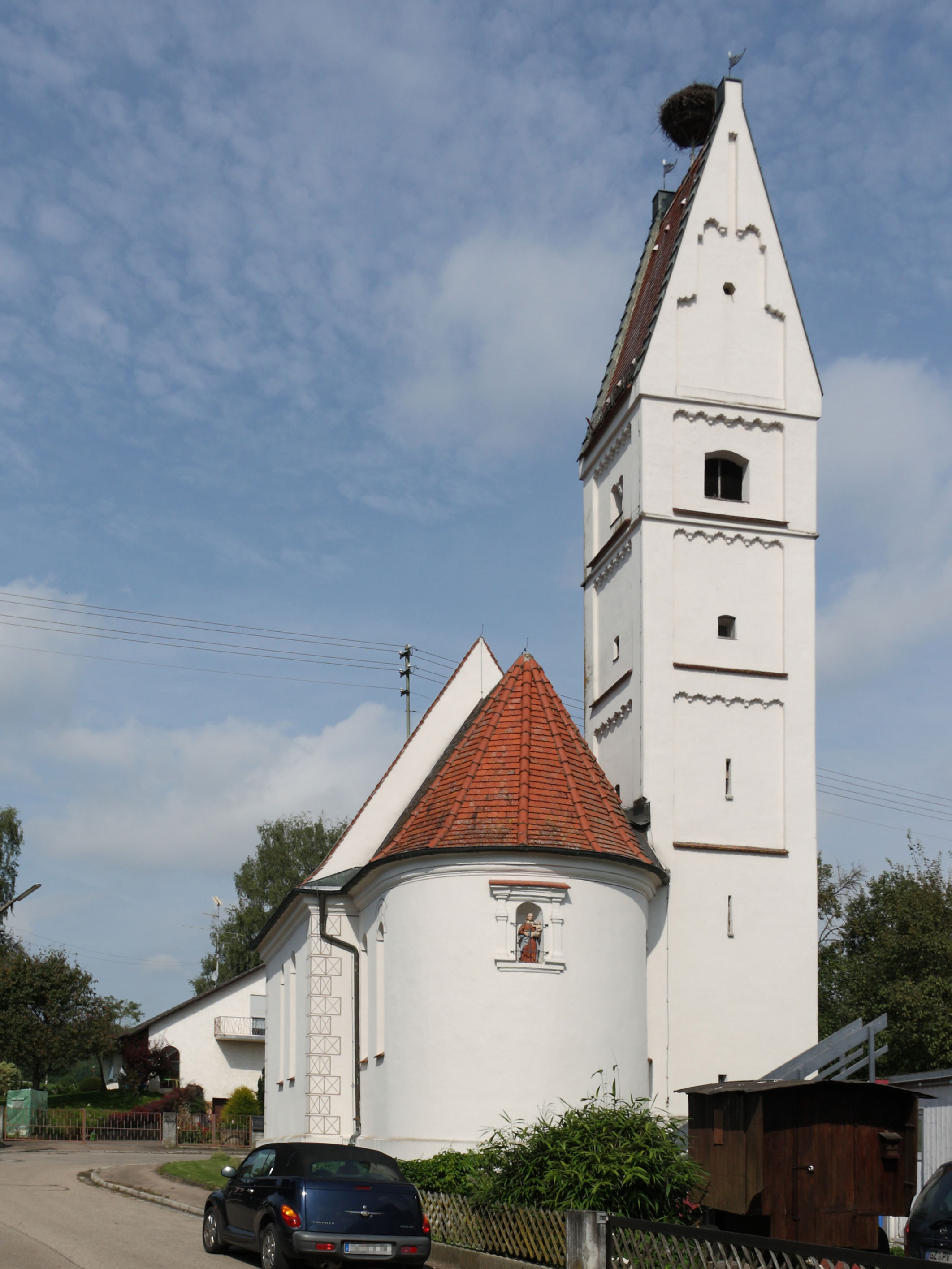 Kath. Filialkirche St. Wolfgang in Unterrohr, Gemeinde Kammeltal; Ostansicht der spätgotischen Kirche, deren Turm im 14./15. Jh., Chor und Langhaus 1691 erbaut wurden